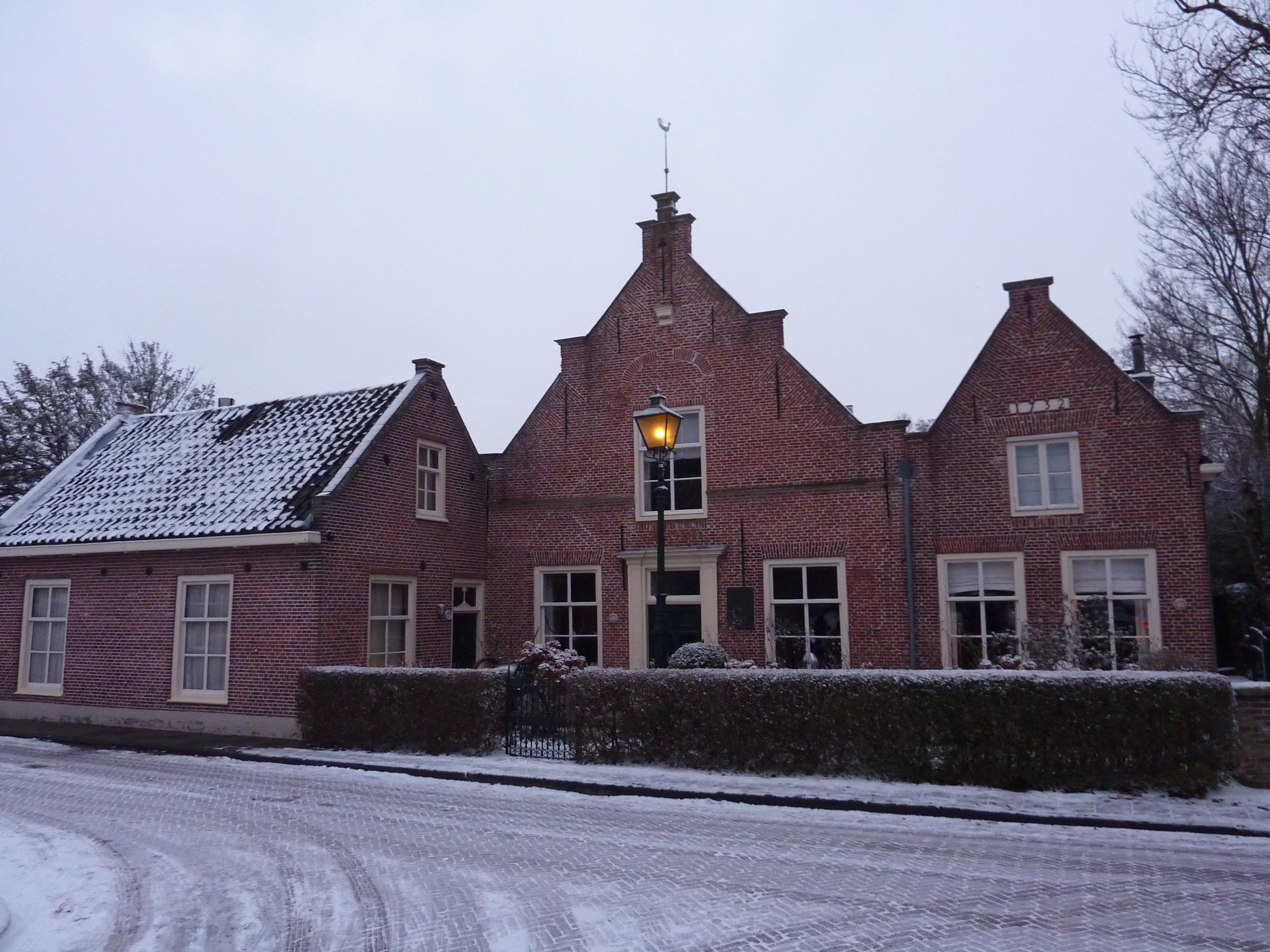 Huisjes, nr 34; laag woninkje met topgevel 19e eeuw; nr 36: huisje met afgeknotte topgevel, bepleisterd, console met jaartal 1611; woonhuis van Jan Steen; nr 38: huisje met topgevel, bepleisterd 1732.